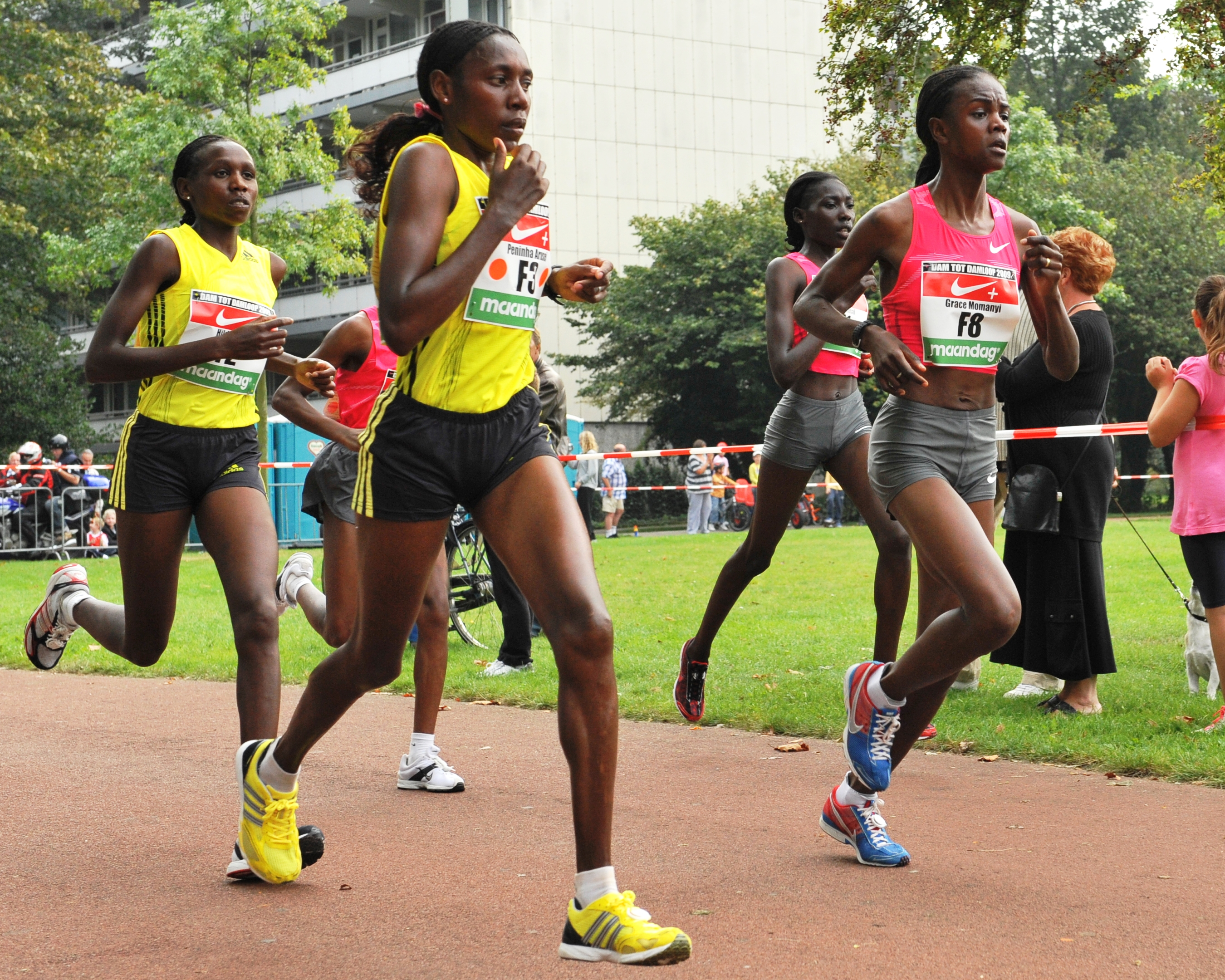 Moses en Linet Masai, broer en zus afkomstig uit Kenia, wonnen de jubileumeditie van de Dam tot Damloop (L-R) Hilda Kibet, Peninah Arusei, Linet Masai, Grace Momanyi